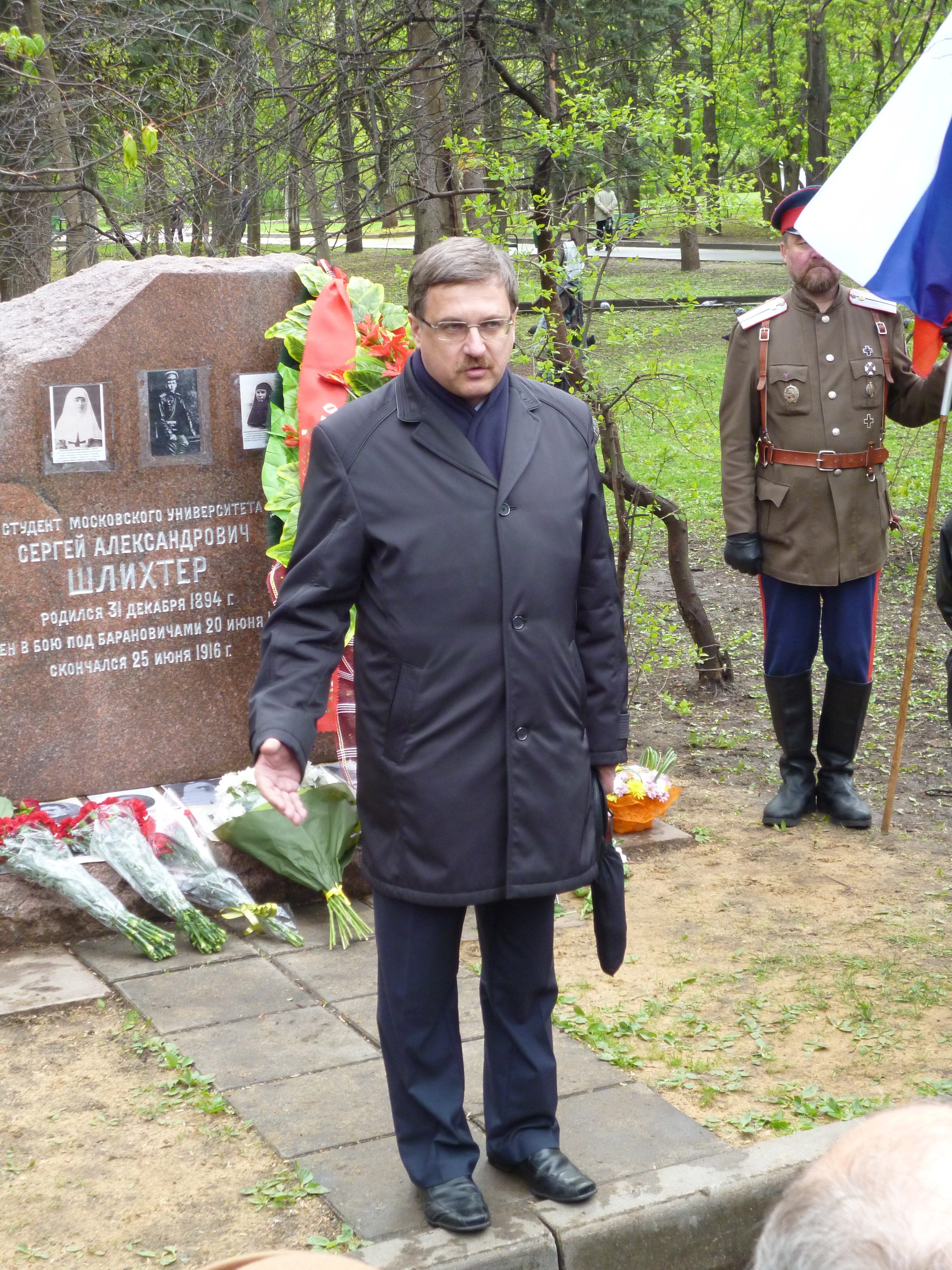 Церемония открытия памятной плиты "Сёстрам милосердия" Ольге Шишмарёвой и Вере Семёновой, погребённым на Братском кладбище у могилы студента Московского университета Сергея Шлихтера, погибшего под Барановичами в 1916 году.